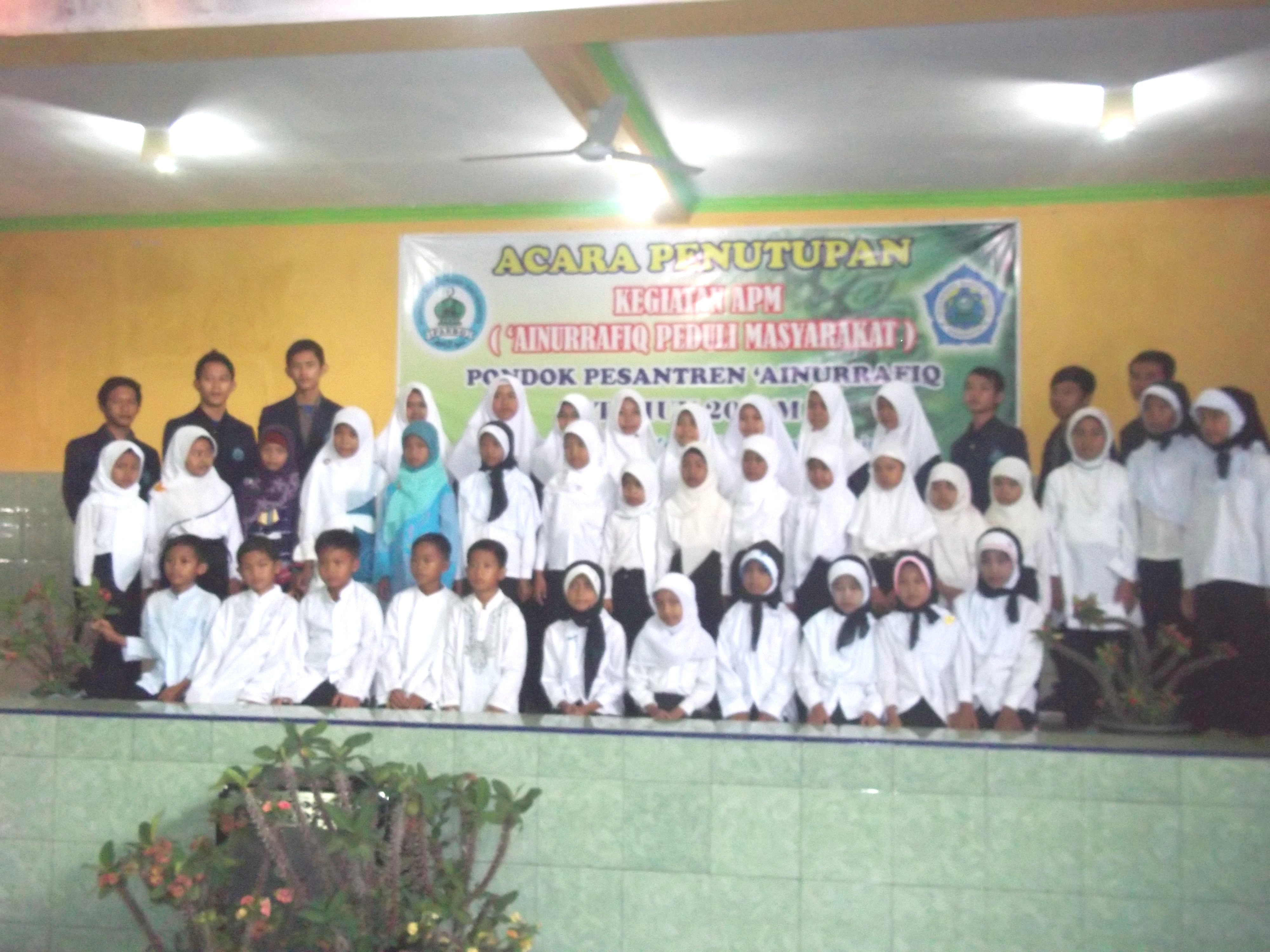 APM ARQ